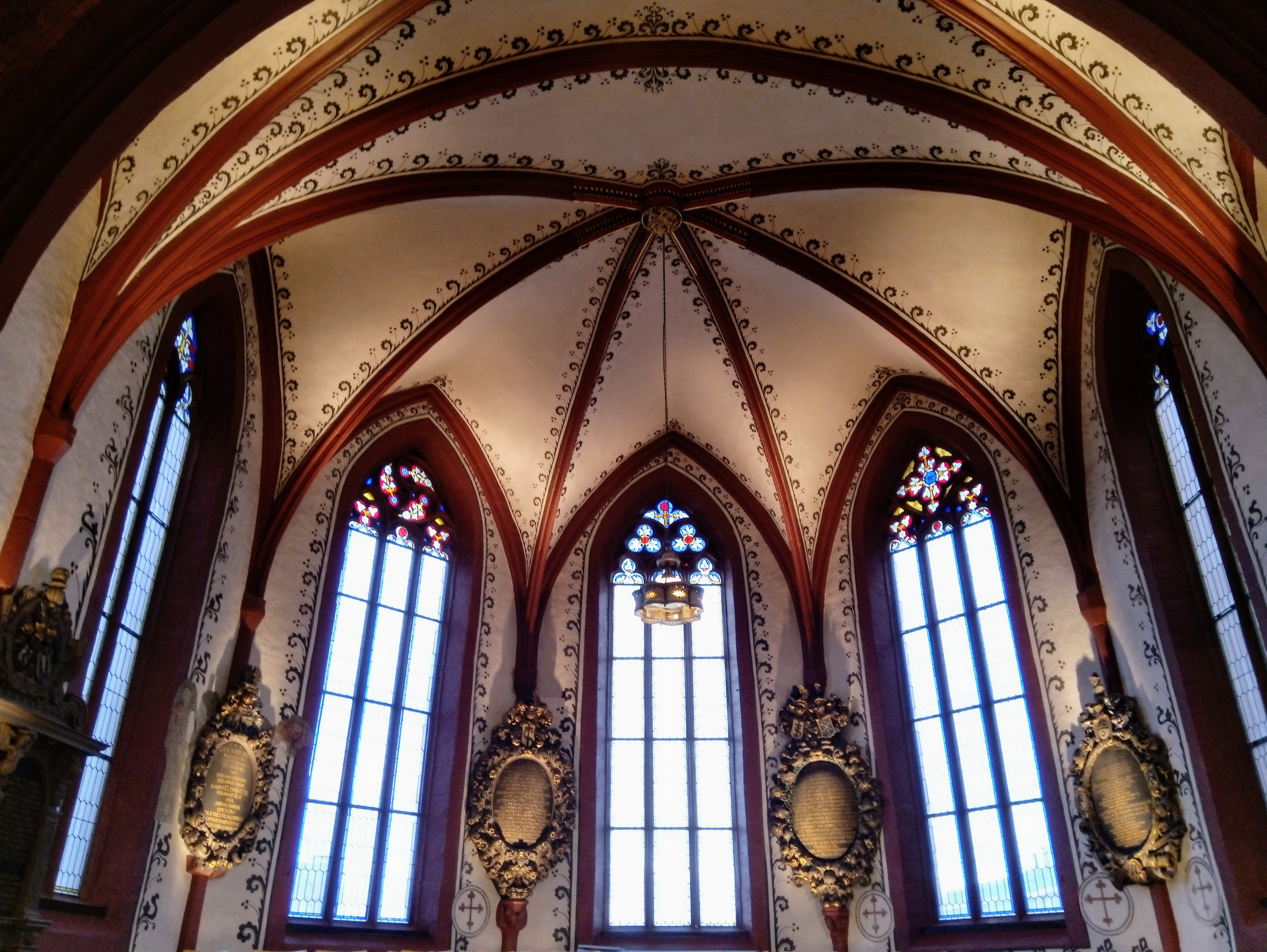 Chor der Martinskirche Basel, anlässlich einer Konzertprobe mit La Cetra.